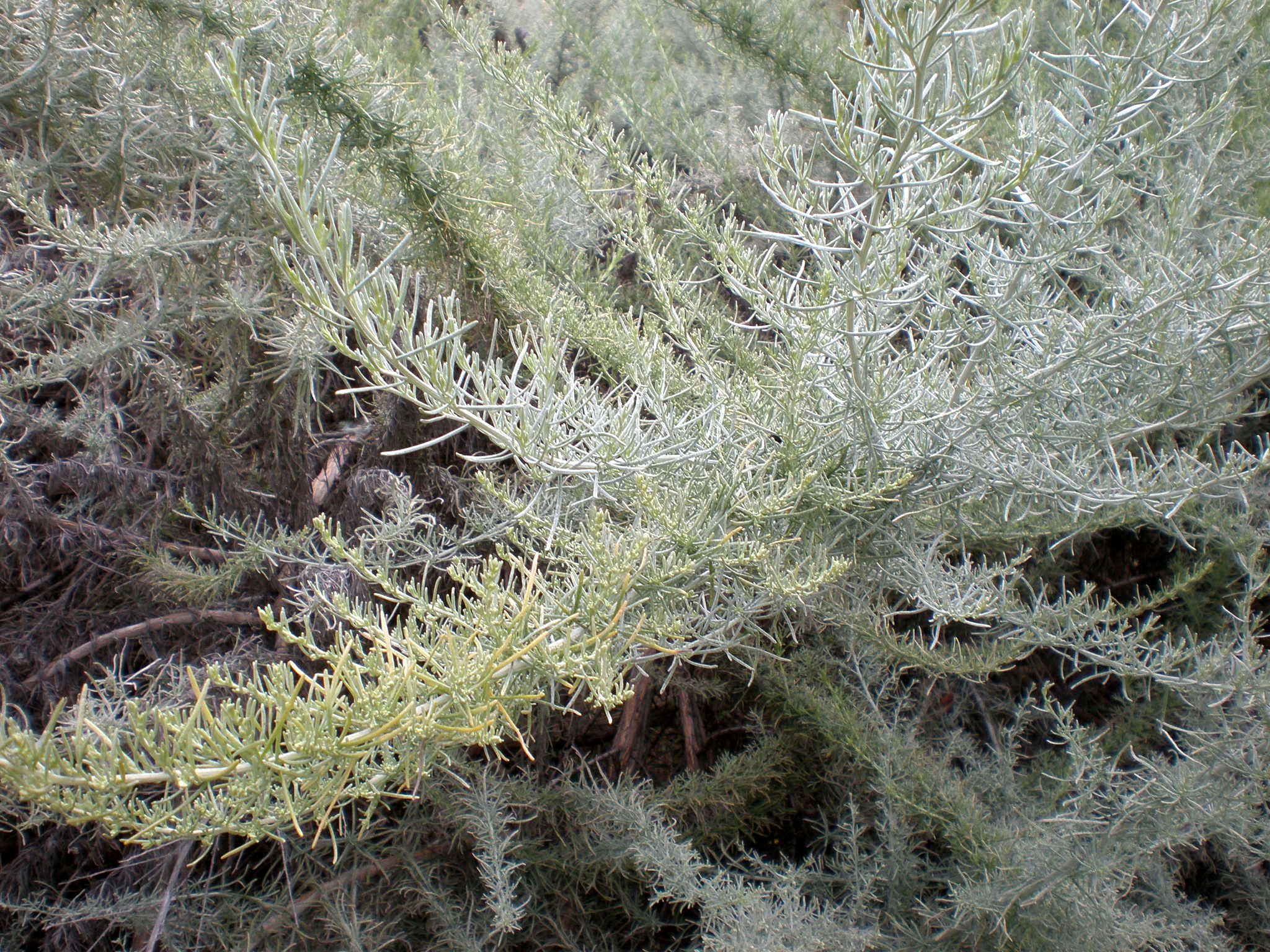 Jardín Botánico de Barcelona.